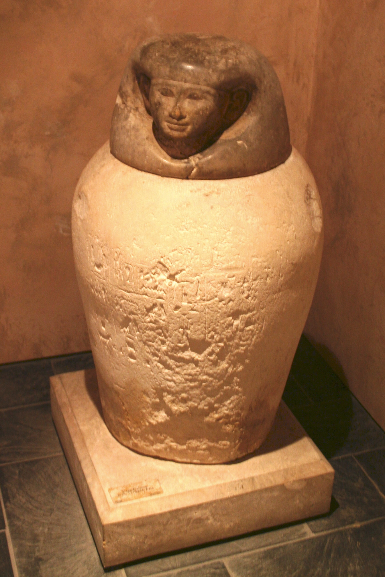 Vase canope, antiquité égyptienne du musée d'archéologie méditerranéenne de la vieille charité à Marseille.